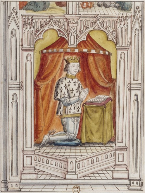 Vitrail des Cordeliers de Nantes : François II, duc de Bretagne, en prière.